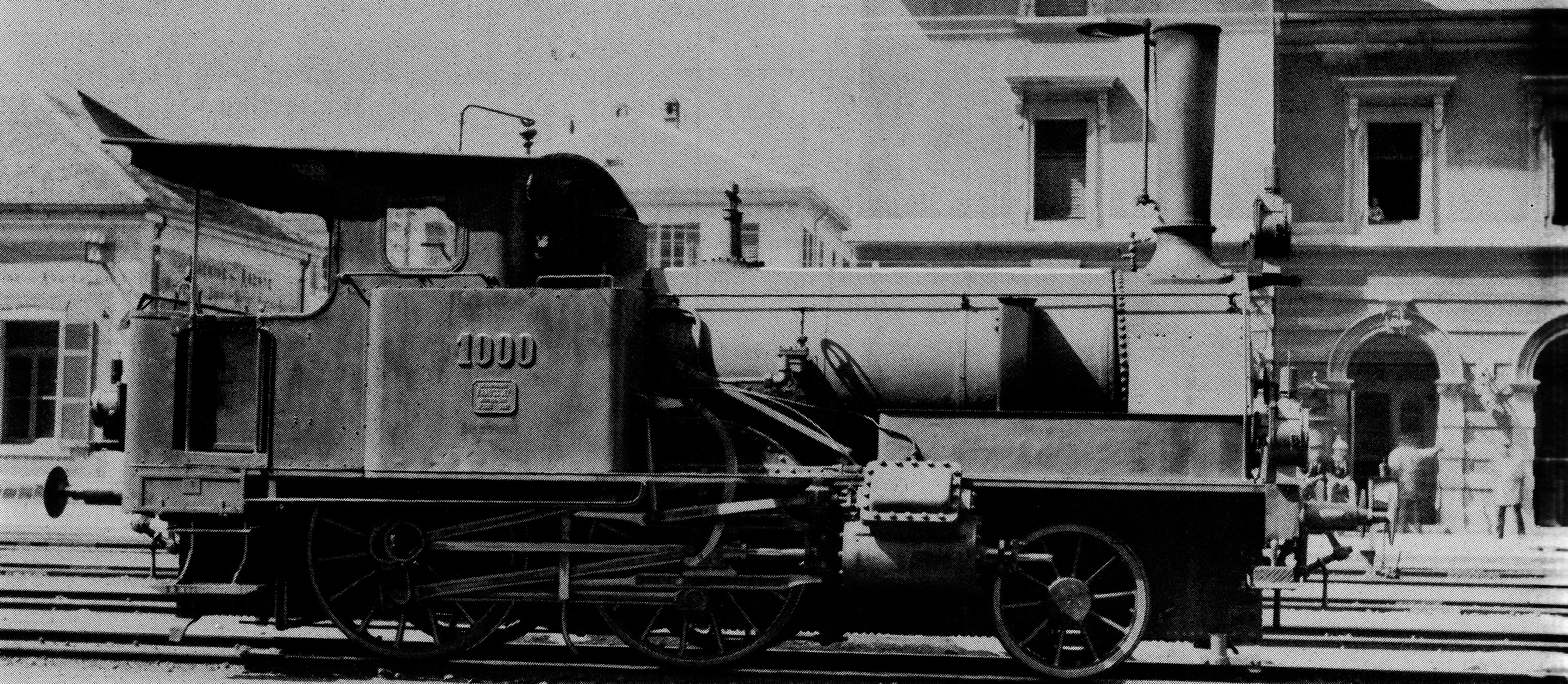 Dampflokomotive E 2/3 Nr. 1000, gebaut 1882 von Krauß & Cie. zu München (Fabr.-Nr. 1000) für die Werrabahn, 1883 auf der Bayerischen Landesausstellung von der Gotthardbahn gekauft, 1909 von den Schweizerischen Bundesbahnen übernommen mit der Betriebsnummer 8200, 1914 ausser Dienst gestellt und anschliessend abgebrochen.